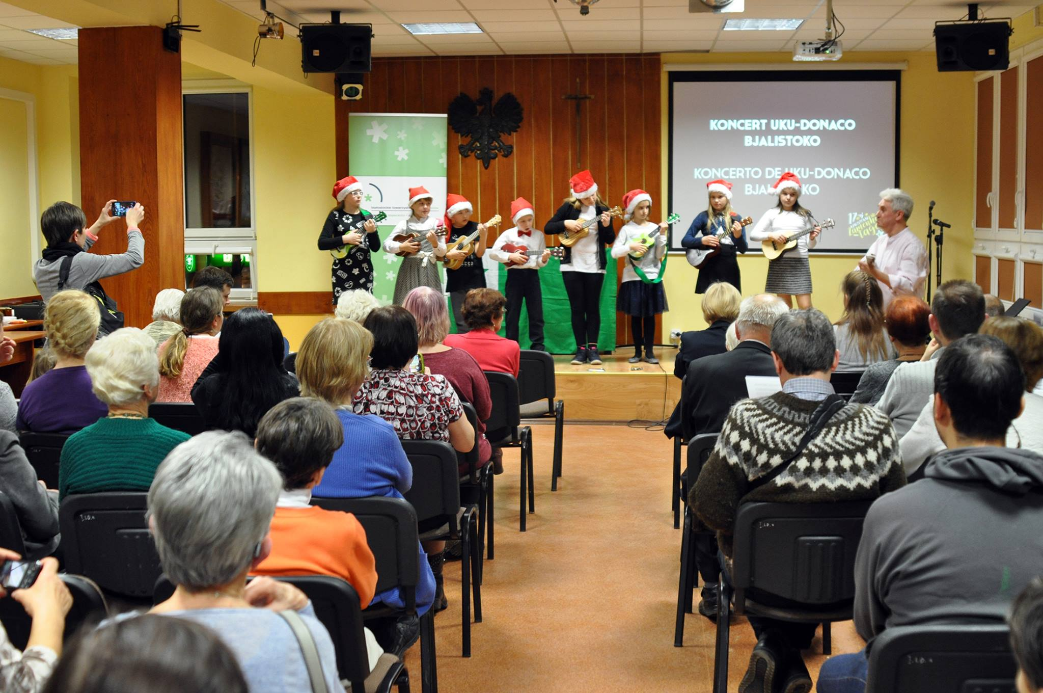 Bjalistokaj Zamenhof-Tagoj 2016. Koncerto de Uku-Donaco Bjalistoko.